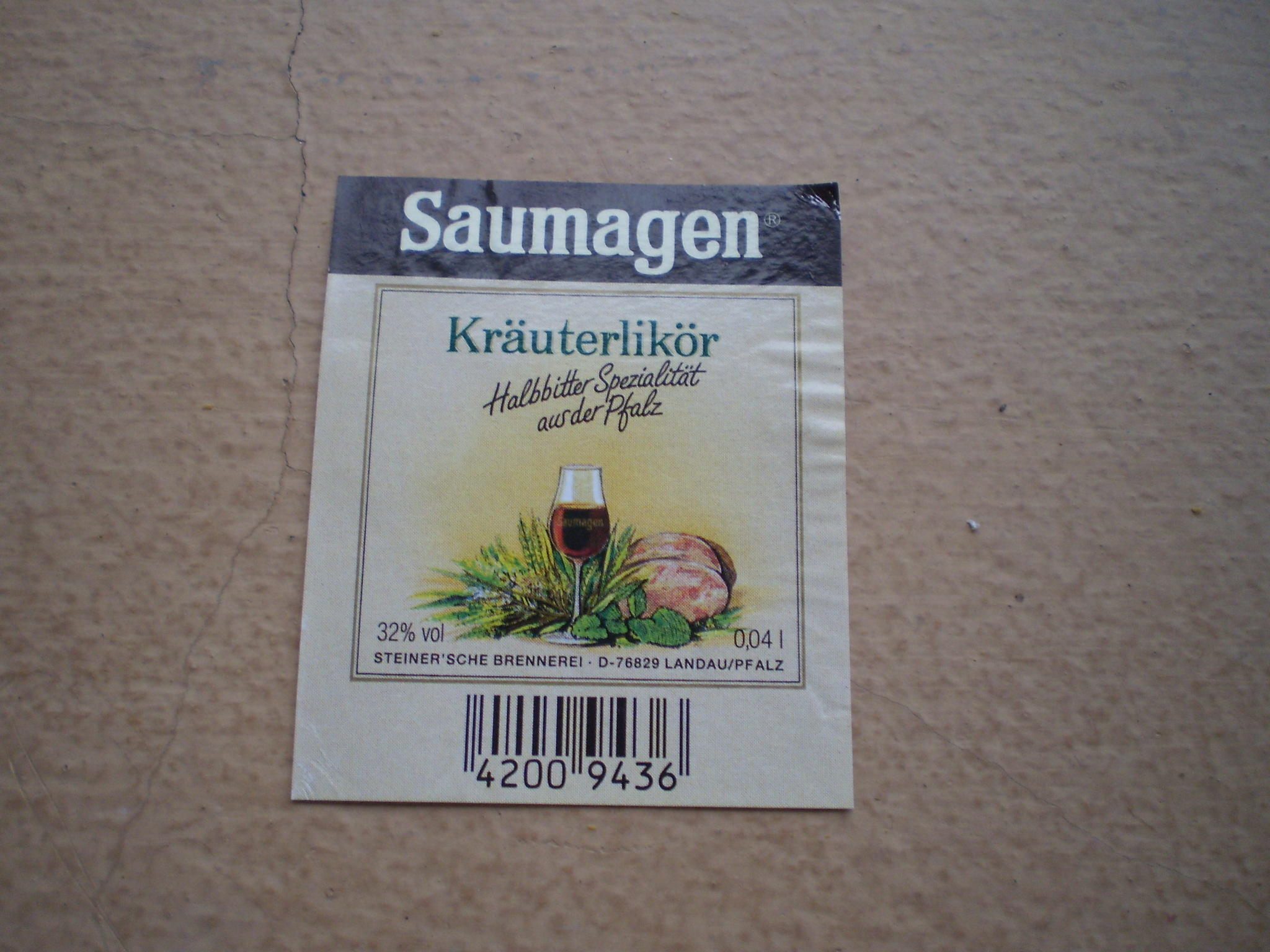 O licor de Saumagen